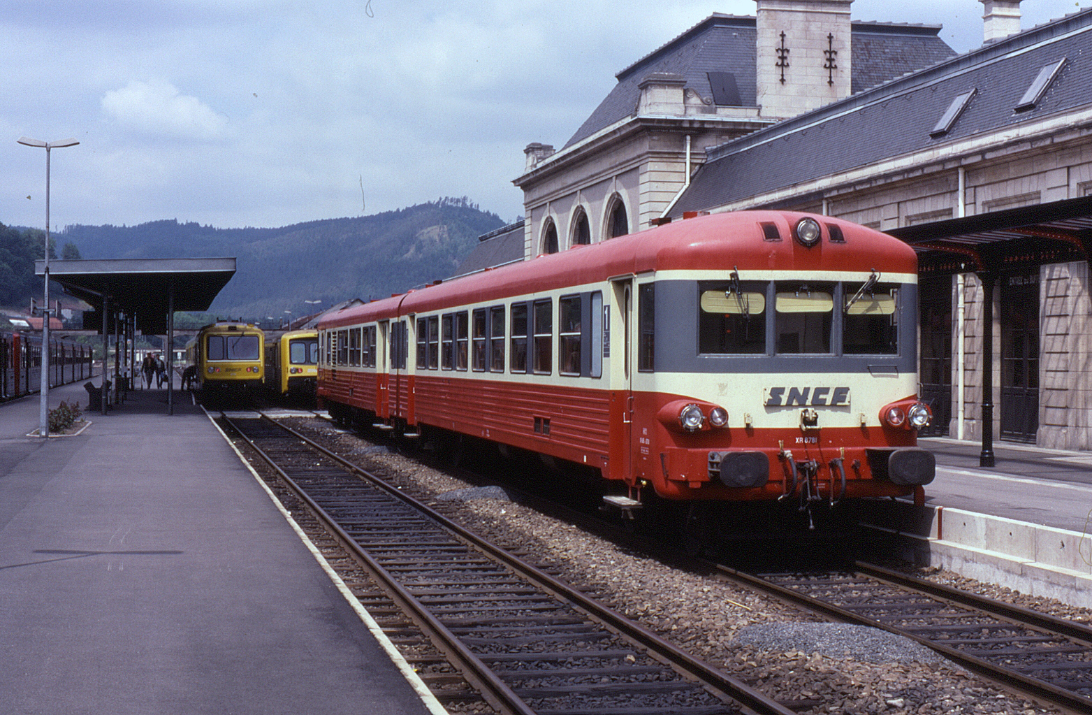 X 4781 at St Dié, 4 June 1991.